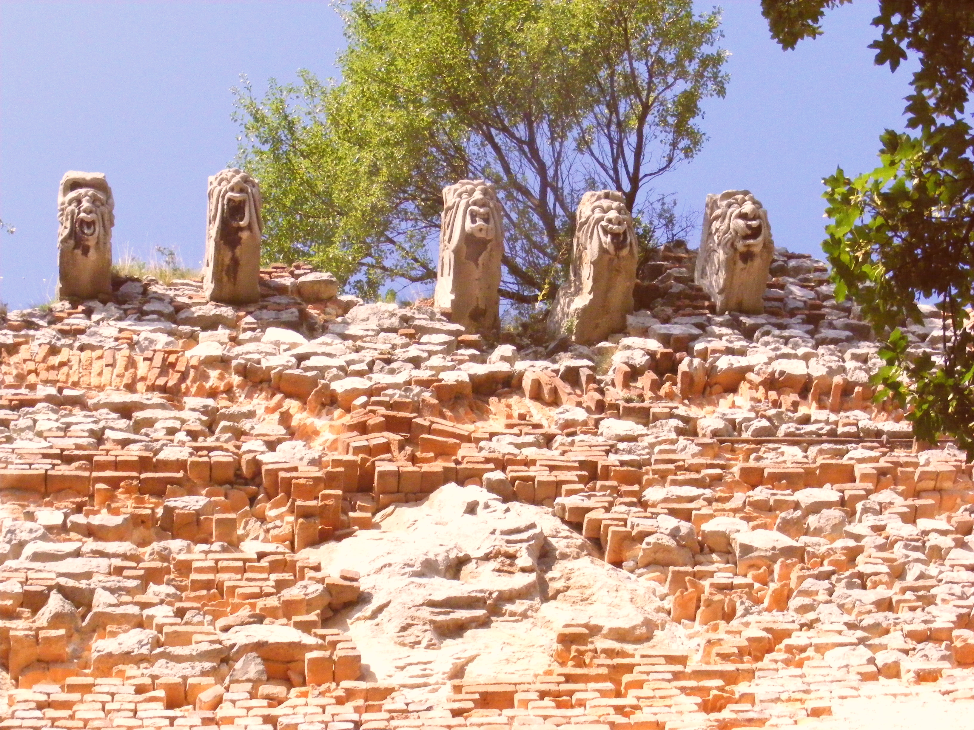 Krákorce na hrade Pajštún